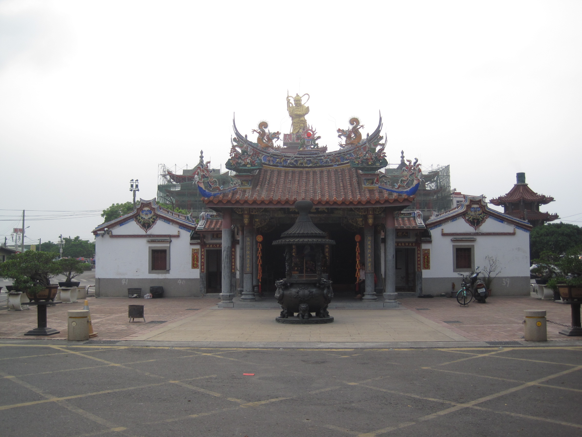 新營太子宮舊廟，為古蹟主體